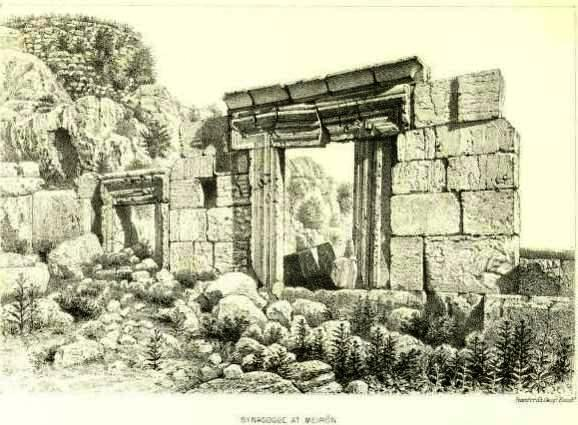 בית הכנסת העתיק במירון כפי שצויר על ידי קלוד קונדר במסגרת הסקר של הקרן לחקר ארץ ישראל